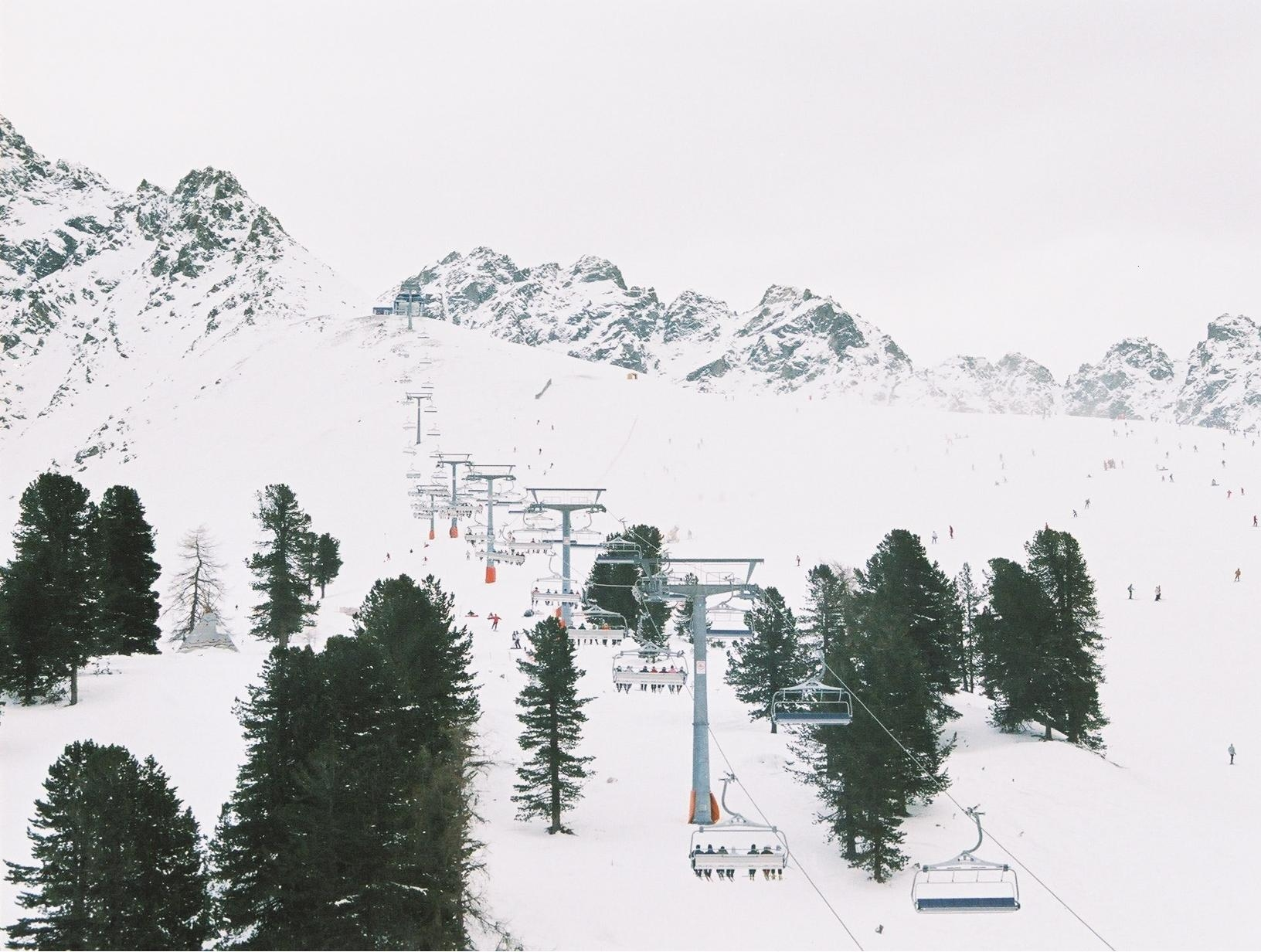 Zirmbahn mit Klopaierspitze und Plamorderspitze im Hintergrund in Nauders am Dreiländereck Österreich Schweiz Italien